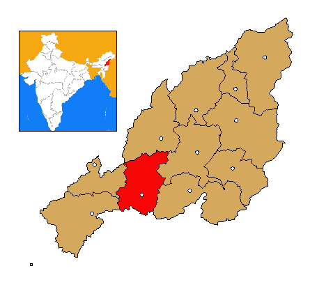 Mapa de localización del distrito